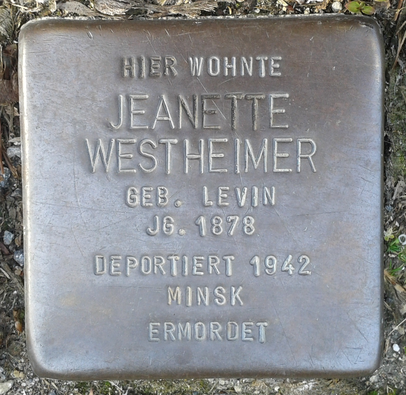 Stolperstein Selm Hauptstraße 34 Jeanette Westheimer